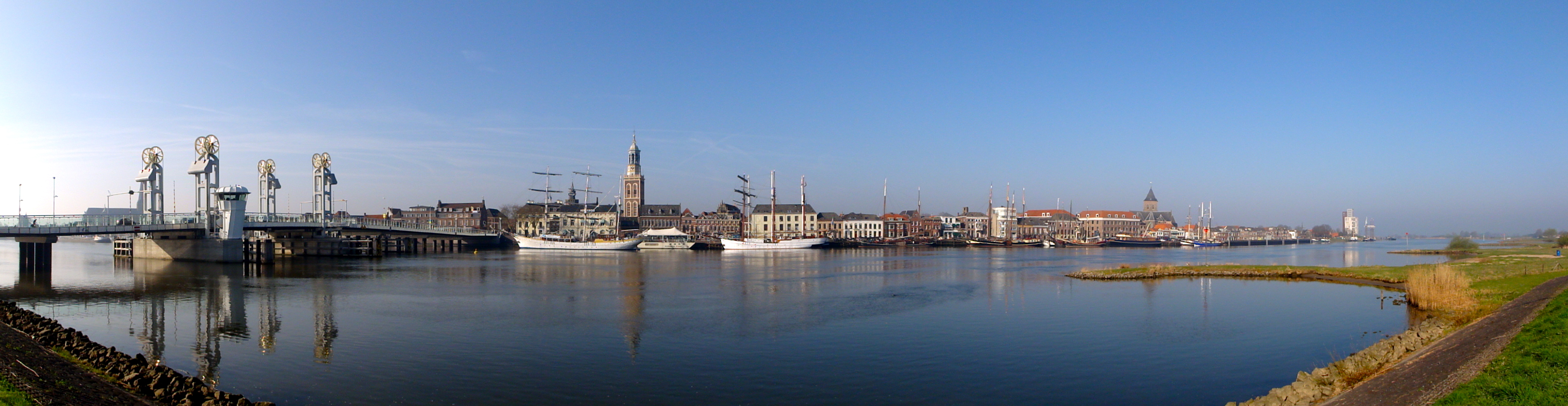 Zicht op Kampen vanaf IJsselmuiden